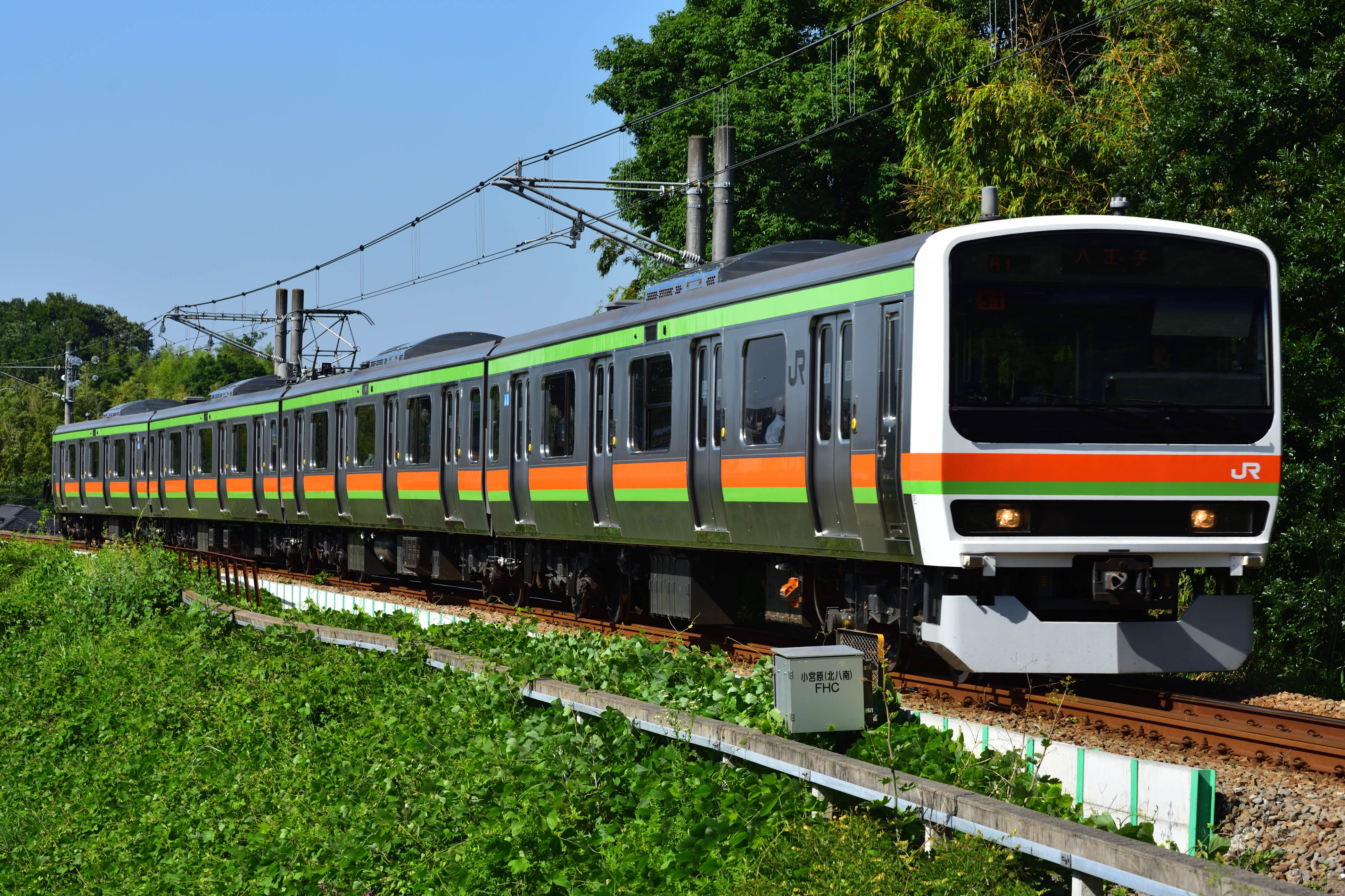 八高線209系3500番台。小宮～北八王子間 Nikon D750